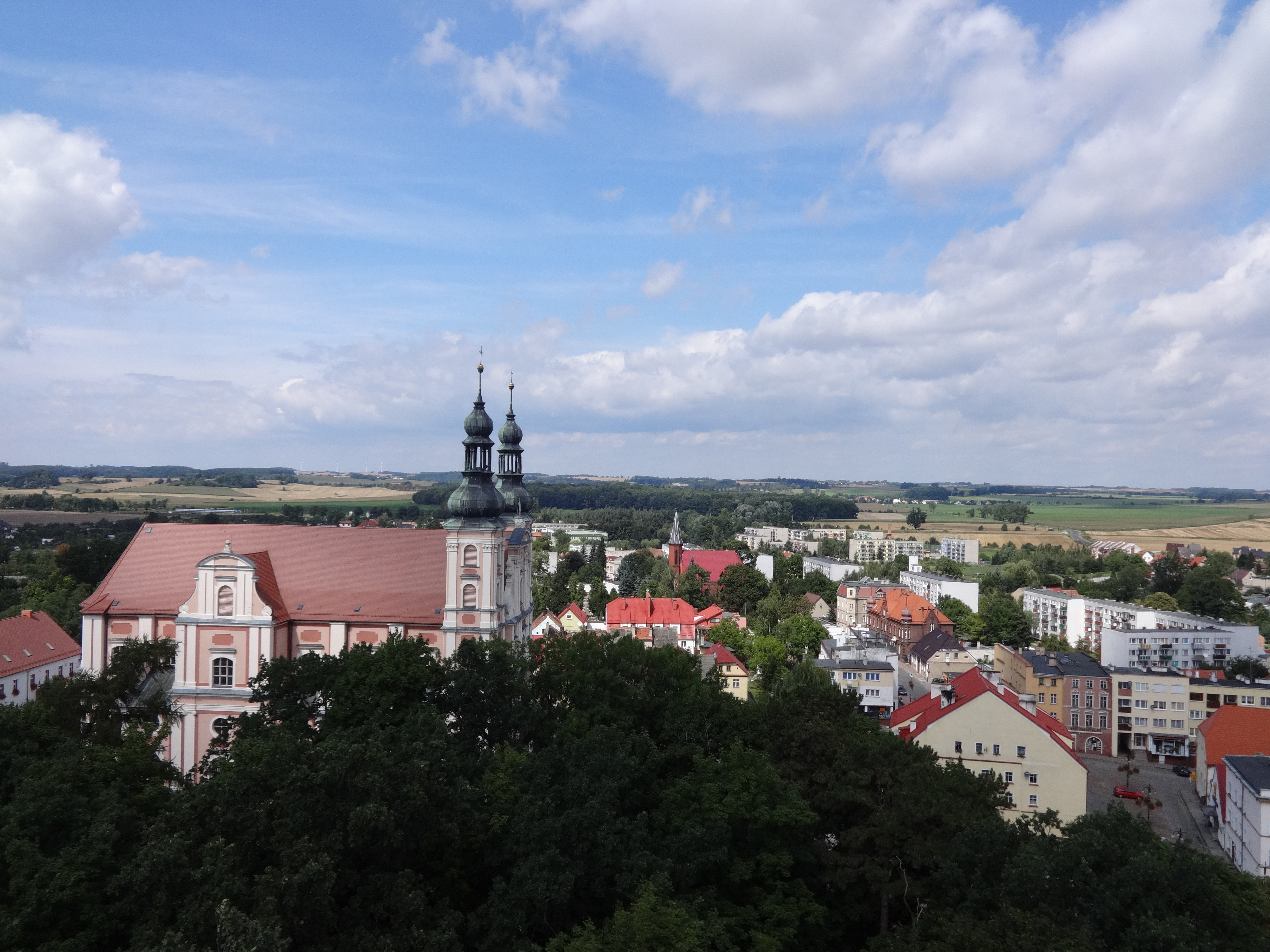 Otmuchów, układ urbanistyczny średniowiecznego założenia miasta